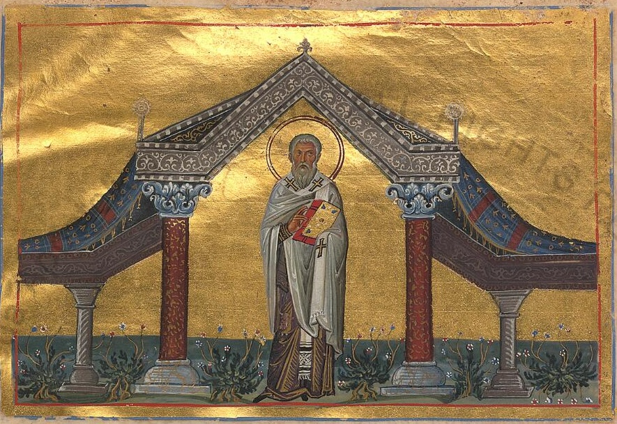 Авксивий Кипрский, епископ Солийский. Константинополь. 985 г. Миниатюра Минология Василия II. Ватиканская библиотека. Рим.